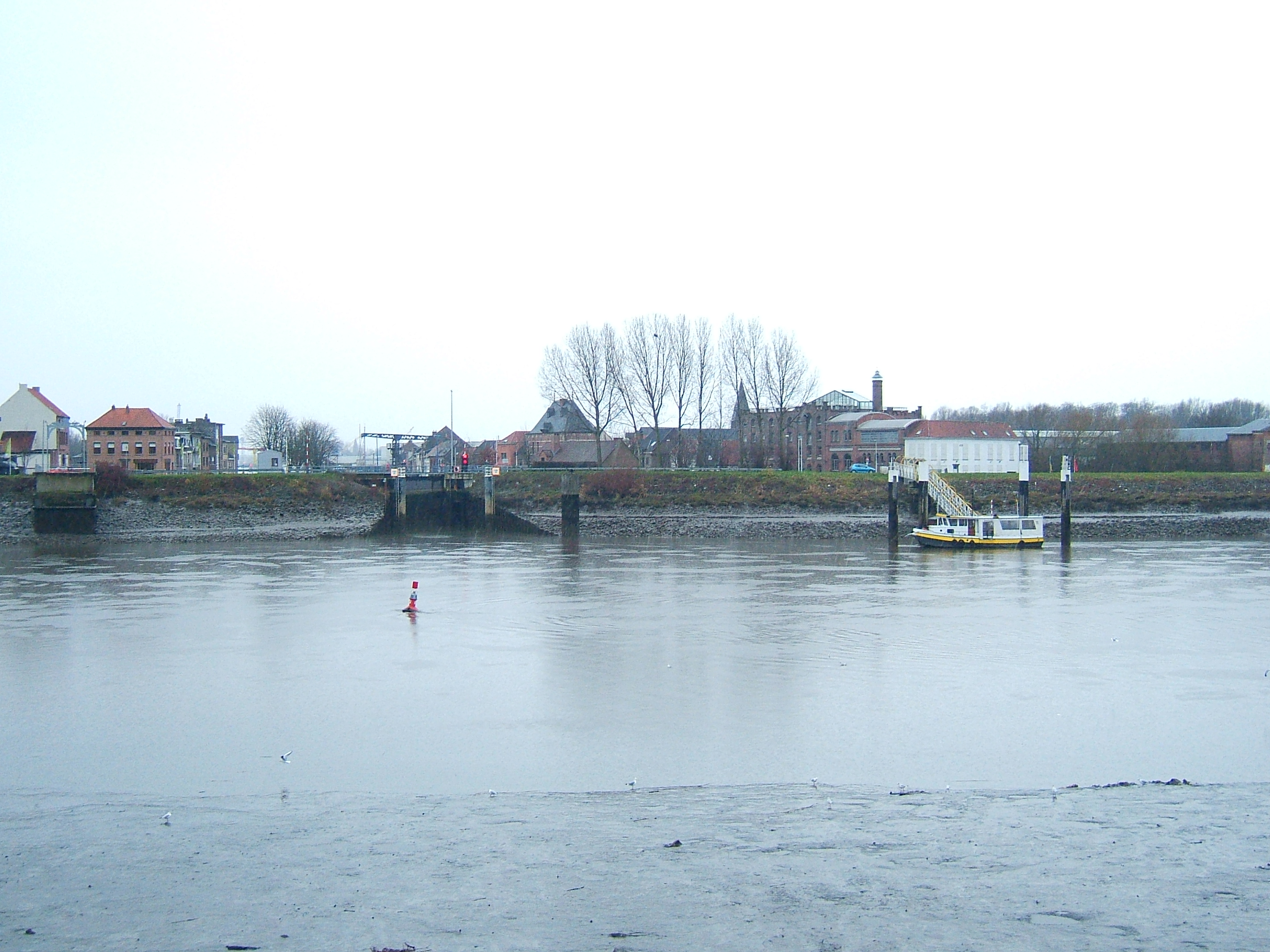 View on Klein-Willebroek